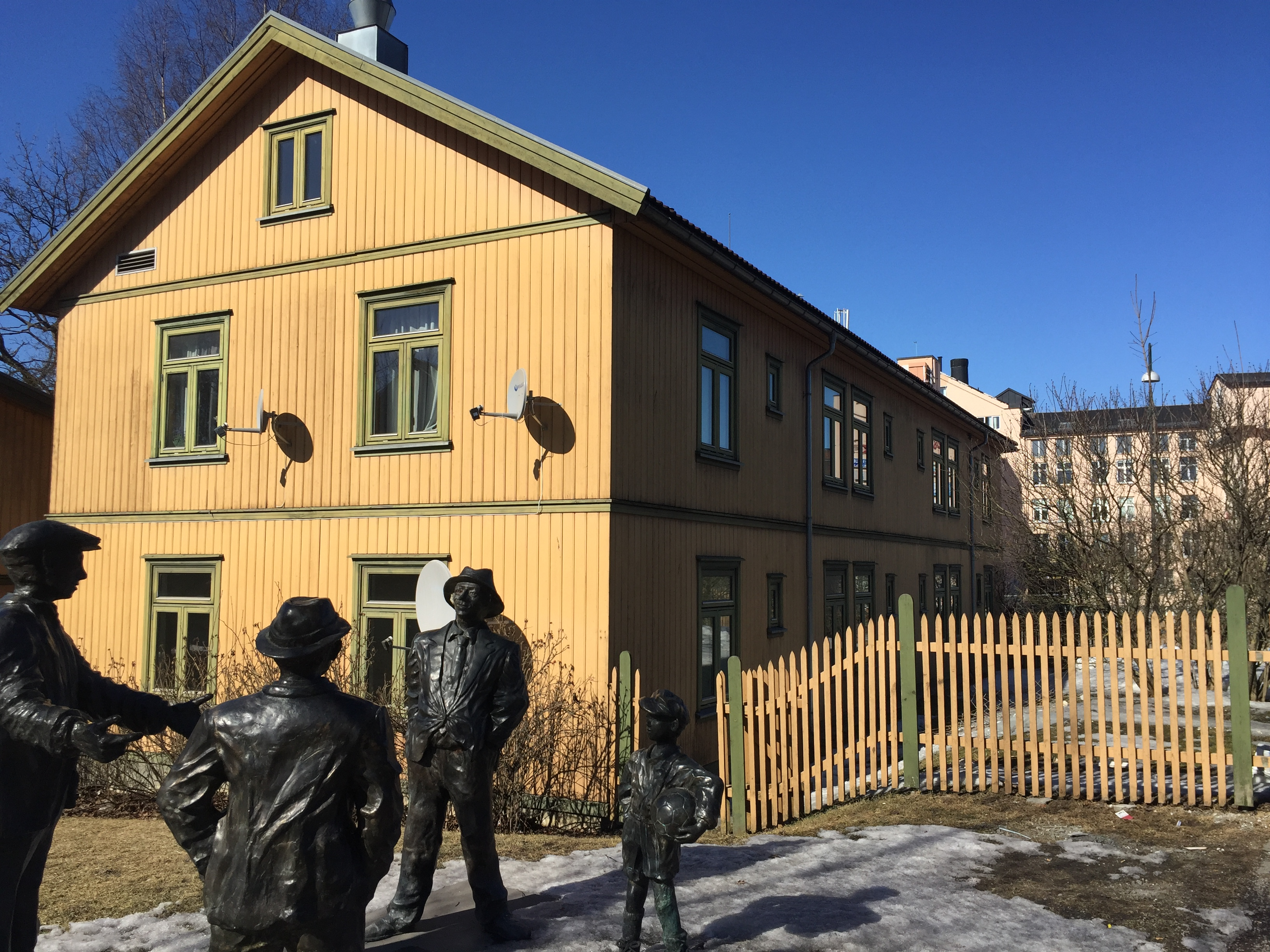 Strømsveien 51 på Vålerenga i Oslo, tomta der Sotahjørnet lå.